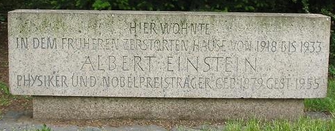 Gedenkschild Einstein, Berlin-Schöneberg Bayerisches Viertel, Haberlandstr. 8 Gedenkstein vor dem Neubau (zur Zeit Einsteins Nr. 5)